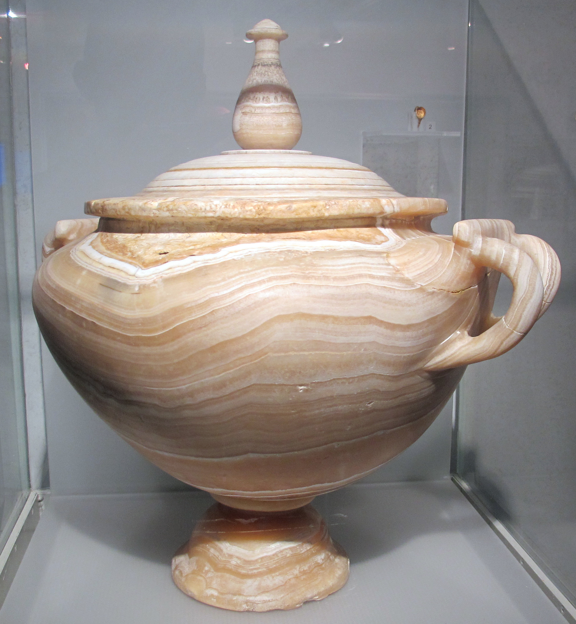 Palazzo Massimo alle Terme (Roma)